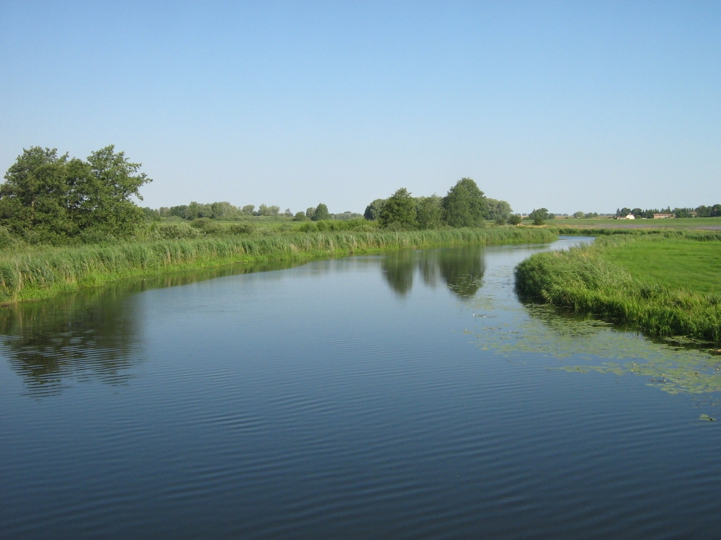 Die Trebel vor Demmin, kurz vor ihrer Mündung in die Peene